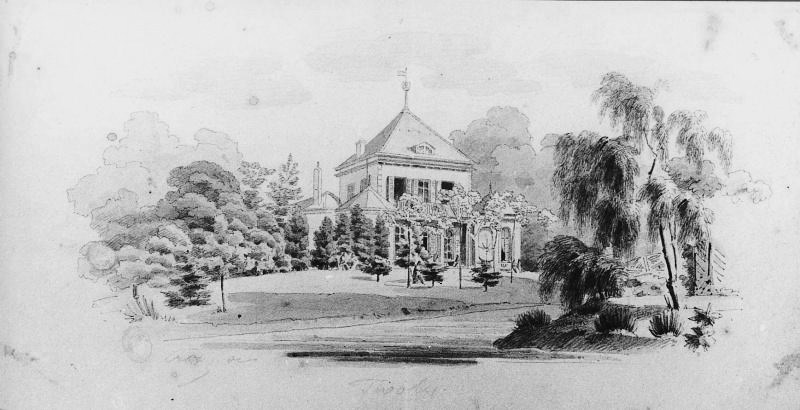 ehemalige Villa Tivoli, Aachen; Alter Stich von Thomas Cranz (1785-1853)